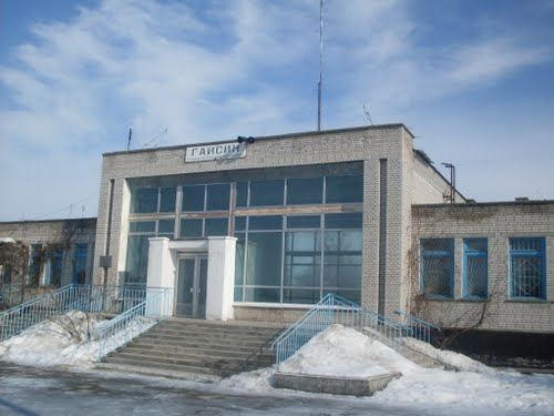 Stancija Haisyn